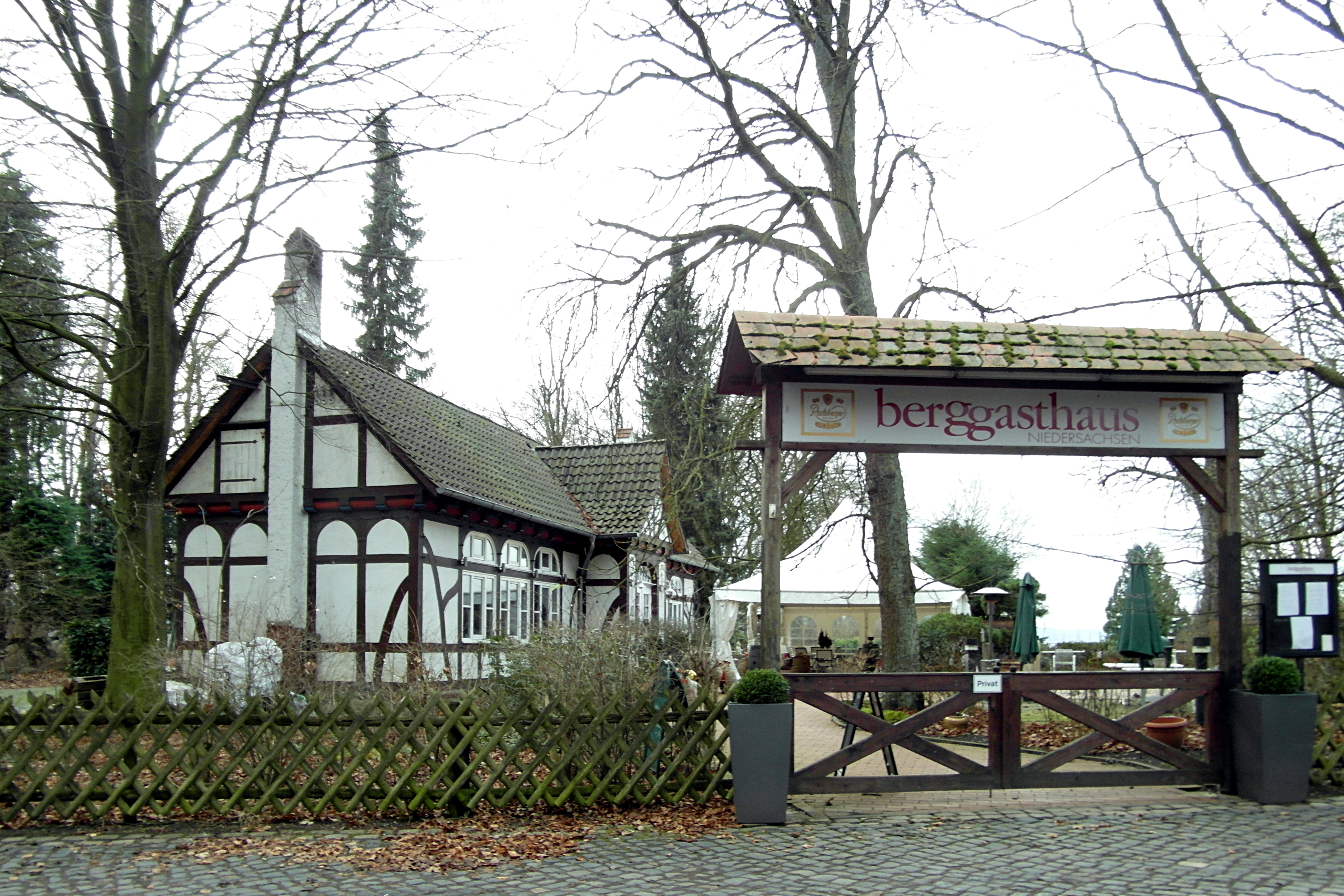 Das Berggasthaus Niedersachsen auf dem Gehrdener Berg in der Region Hannover in Niedersachsen